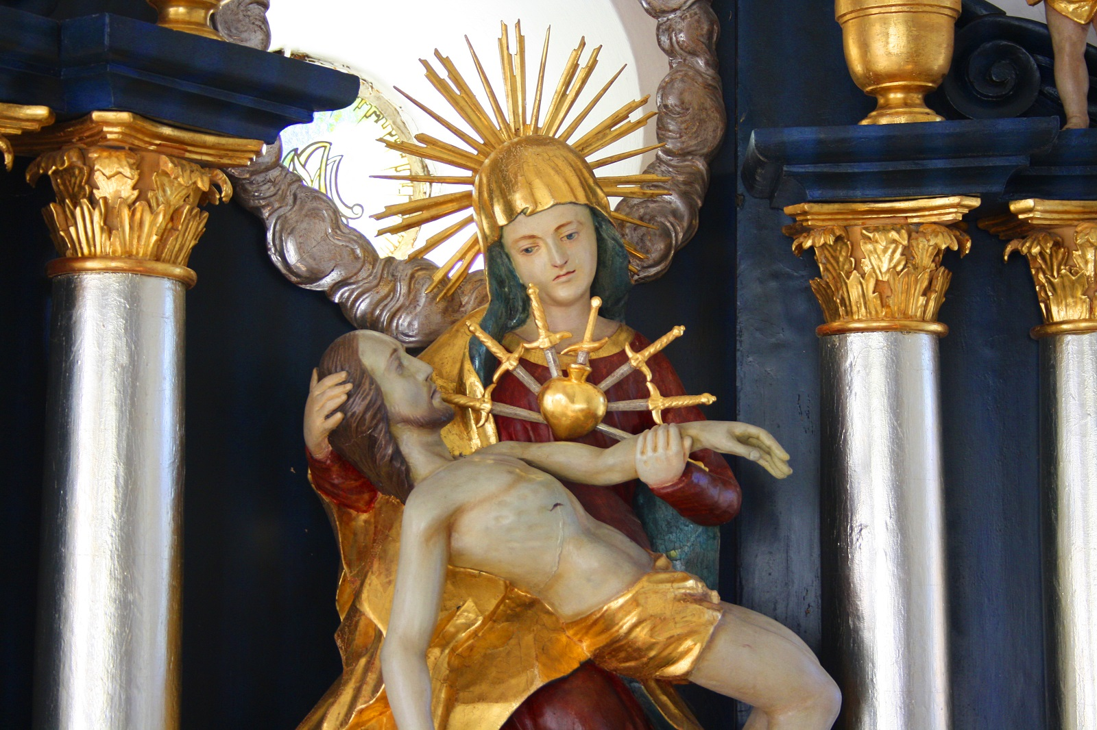 Die Pietà des Altars des Friedhofskircherls in Bodenmais